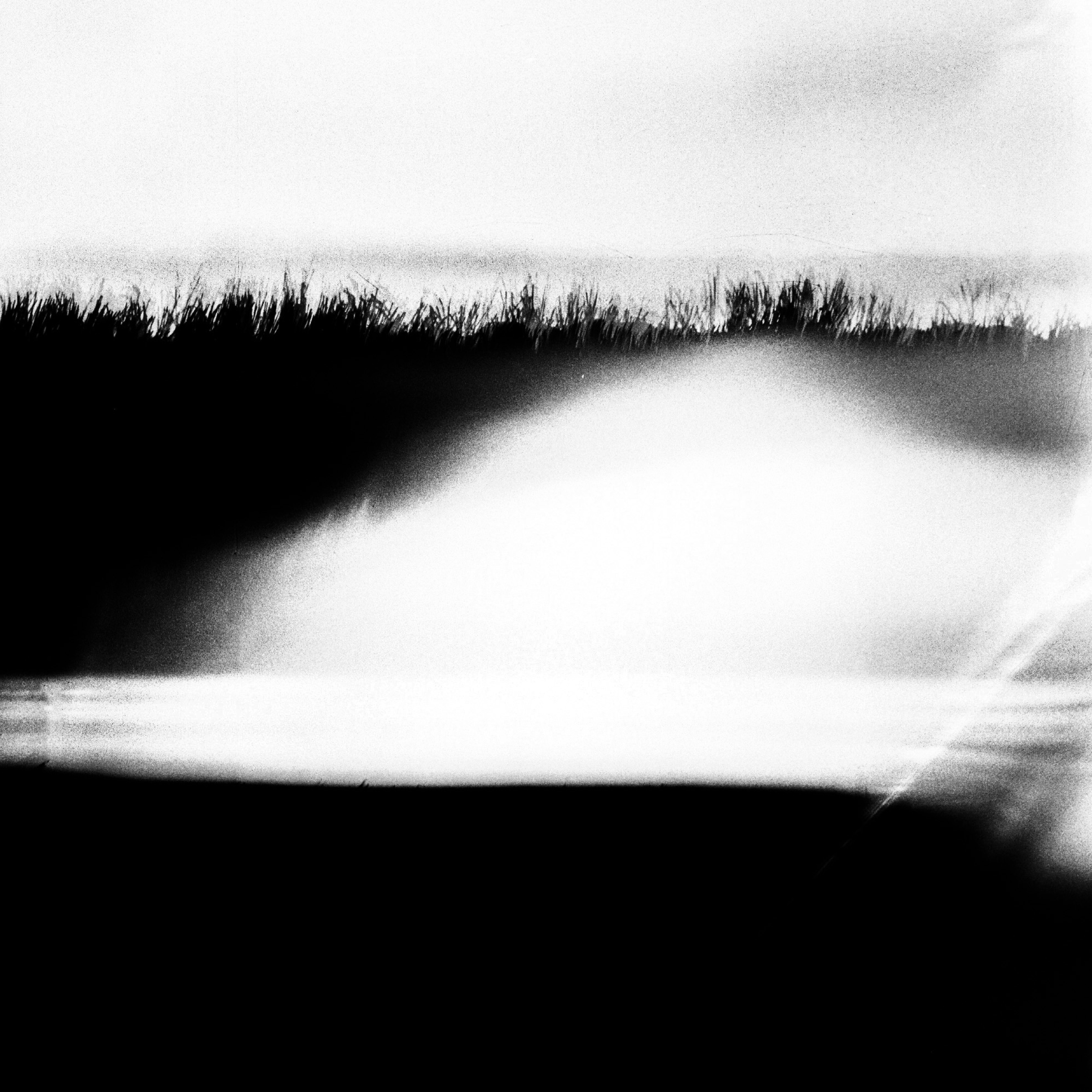 Portada de POSDATA (2018, Elefante en la Habitación!), 4º álbum del Ensamble Chancho a Cuerda.